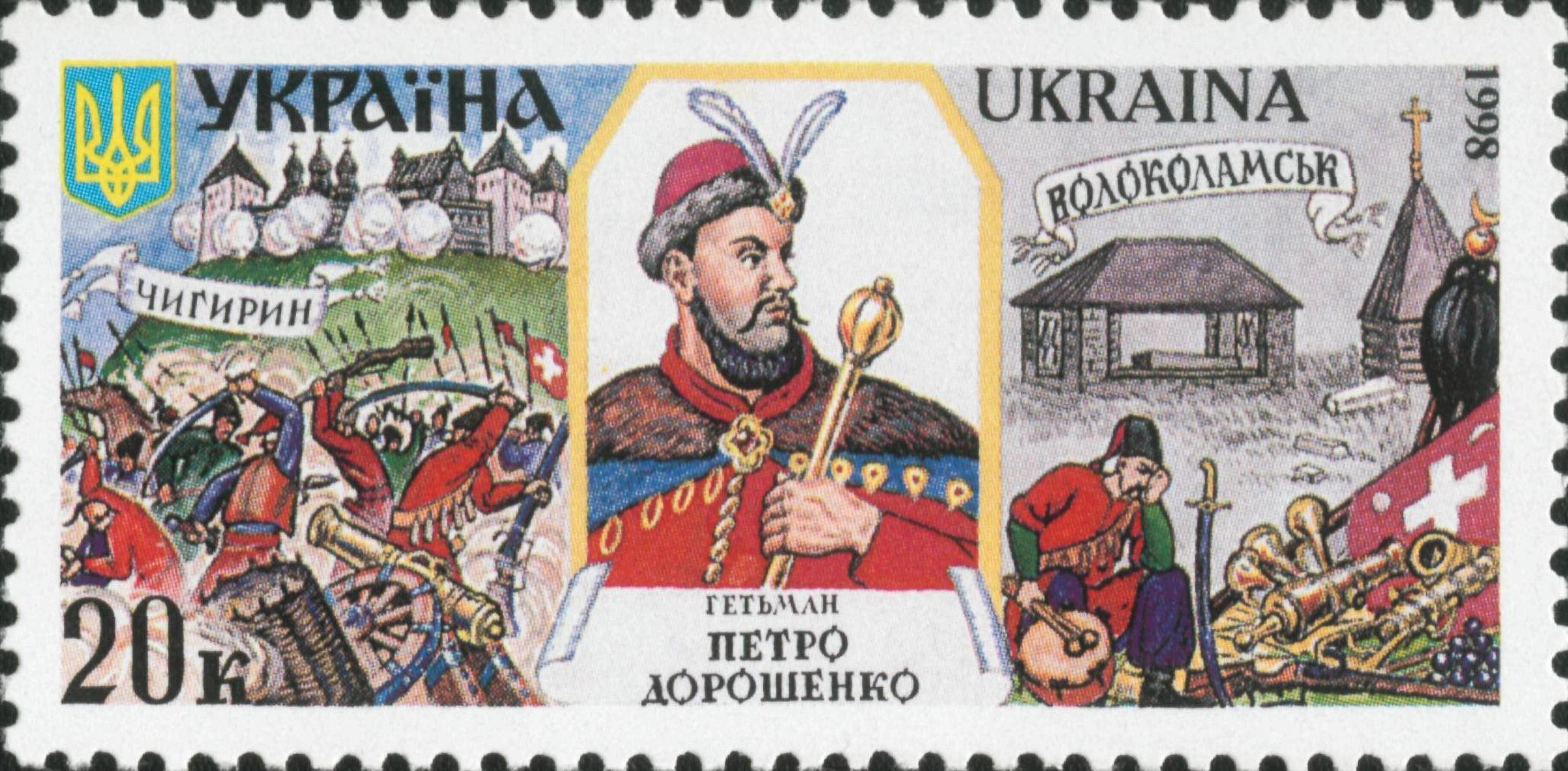 Марка Украины из серии Гетманы Украины. Пётр Дорошенко